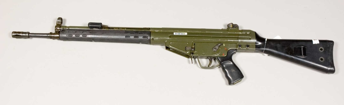 Provserie av Ak 4 i grönt. Serienummer/tillverkningsnummer: 403468